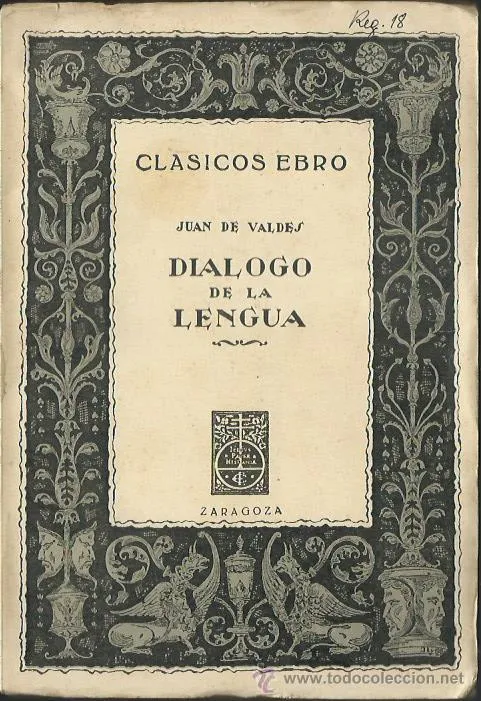 Il Compendio del signor Massimo Troiano tratta dall’ Osservationi della Lingua Castigliana del signor Giovanni Miranda. Con le Annotazioni del signor Argisto Giuffredi